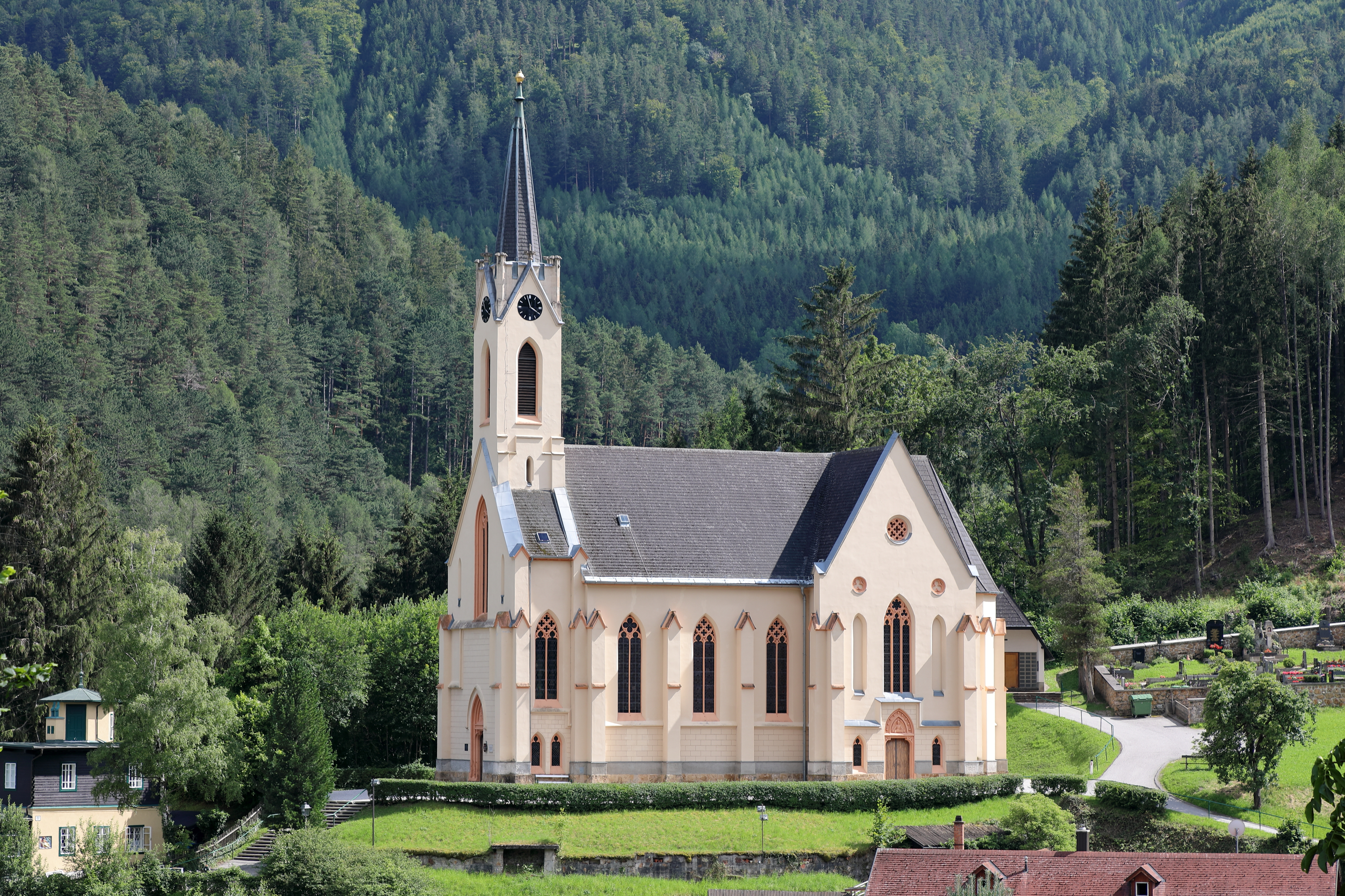 Nordansicht der röm.-kath. Pfarrkirche Pauli Bekehrung in Prein an der Rax, ein Dorf in der niederösterreichischen Marktgemeinde Reichenau an der Rax. Der einschiffige, neugotische Bau mit angedeutetem Querschiff sowie einem rd. 40 m hohen Ostturm wurde ab 1861 nach Plänen von Josef Fiedler errichtet und 1866 geweiht.